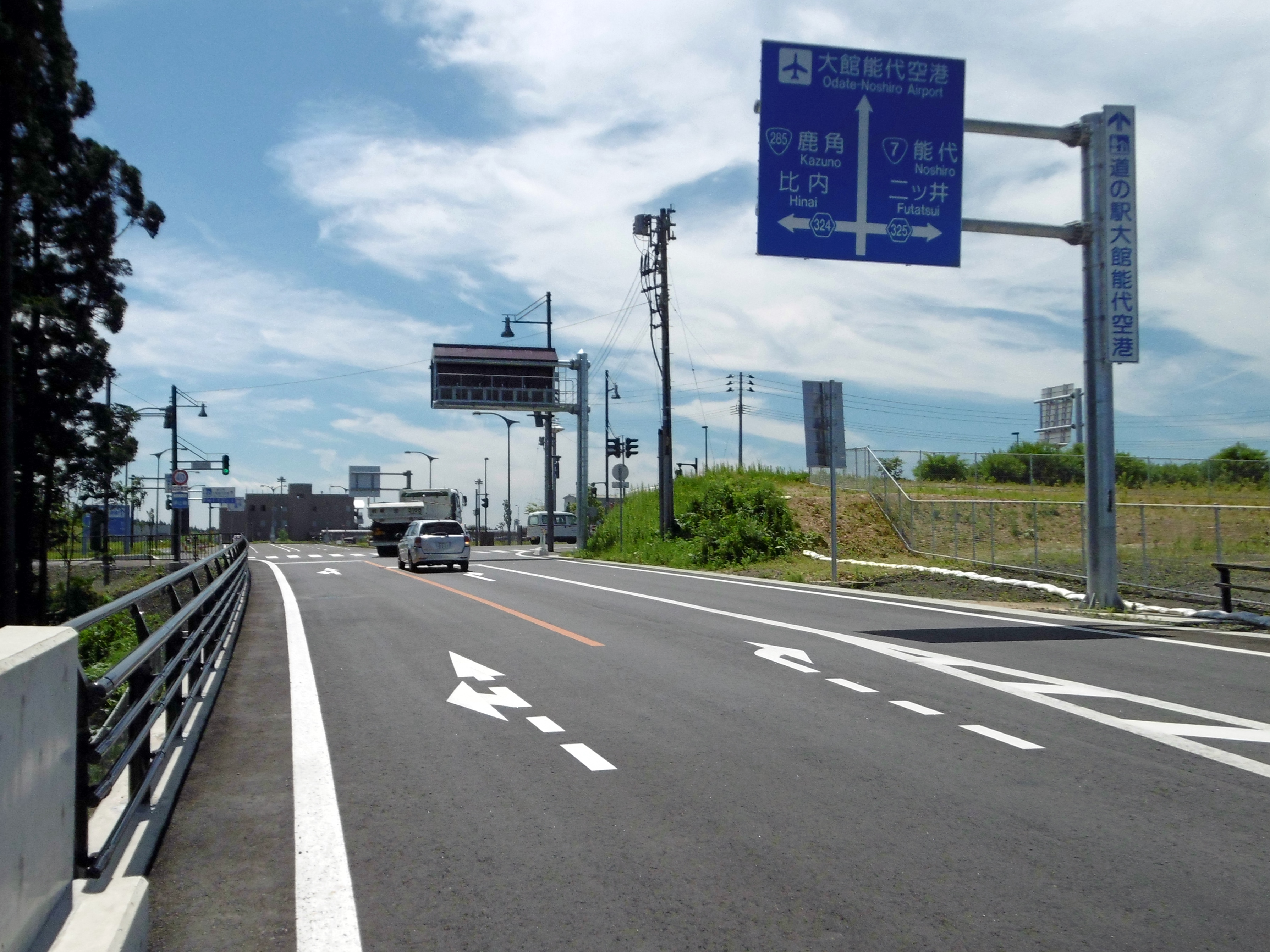 大館能代空港入口交差点